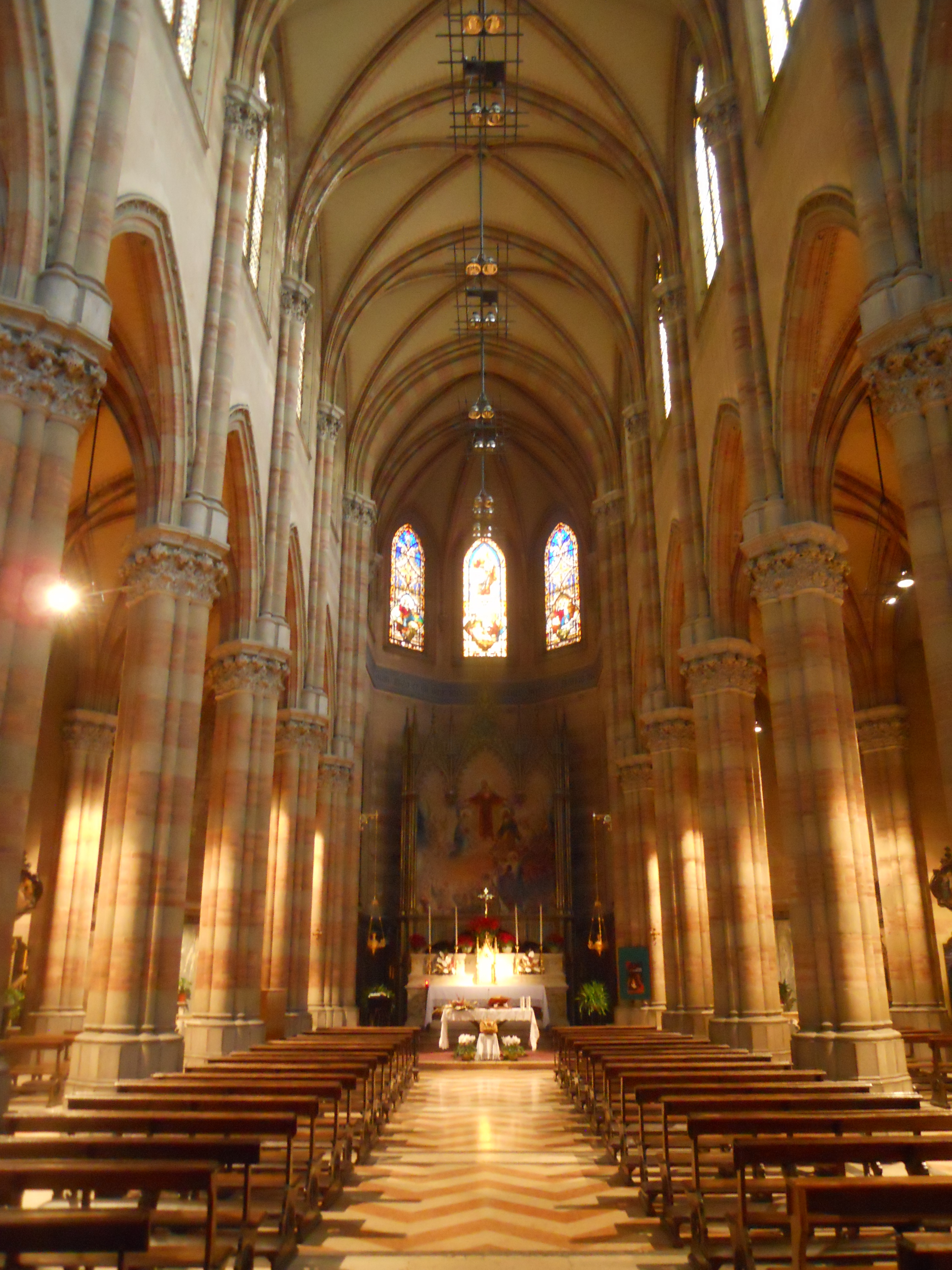 Interno a tre navate della chiesa del Sacro Cuore di Gesù in Prati a Roma.